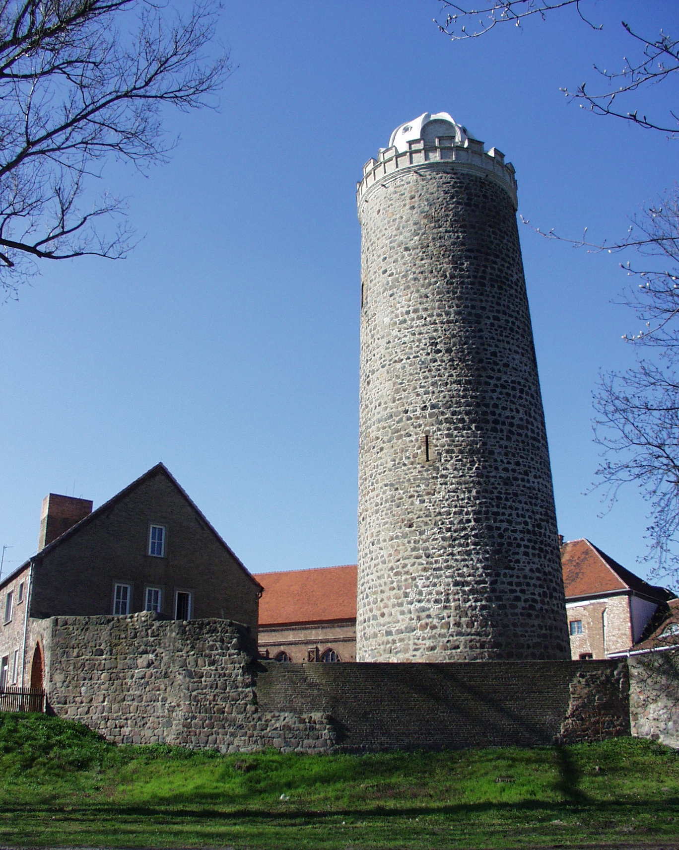 Burg Ziesar - Bergfried - selbst fotografiert 2004